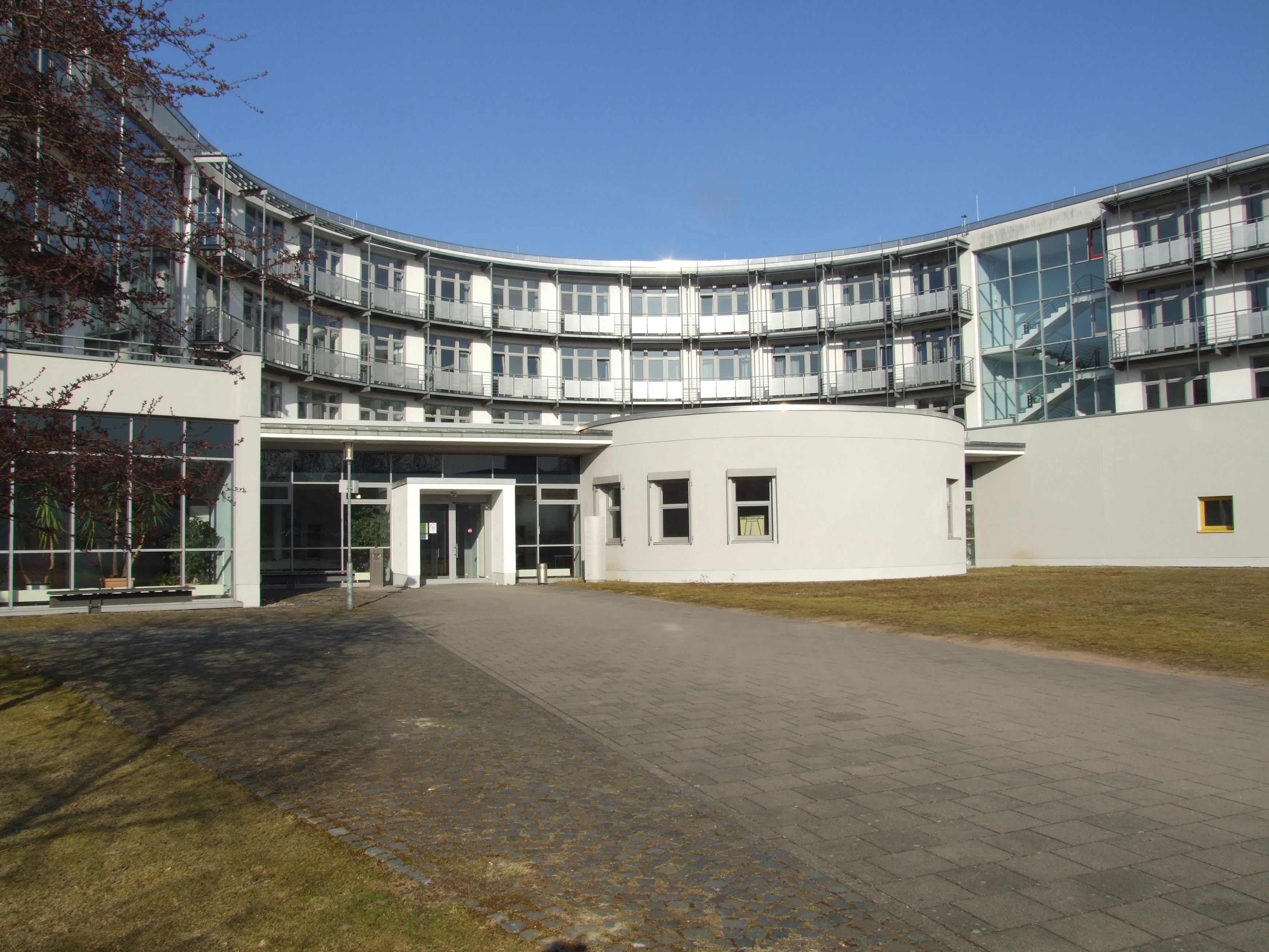 Eingang Gästehaus der Deutschen Universität für Verwaltungswissenschaften Speyer (von Osten)